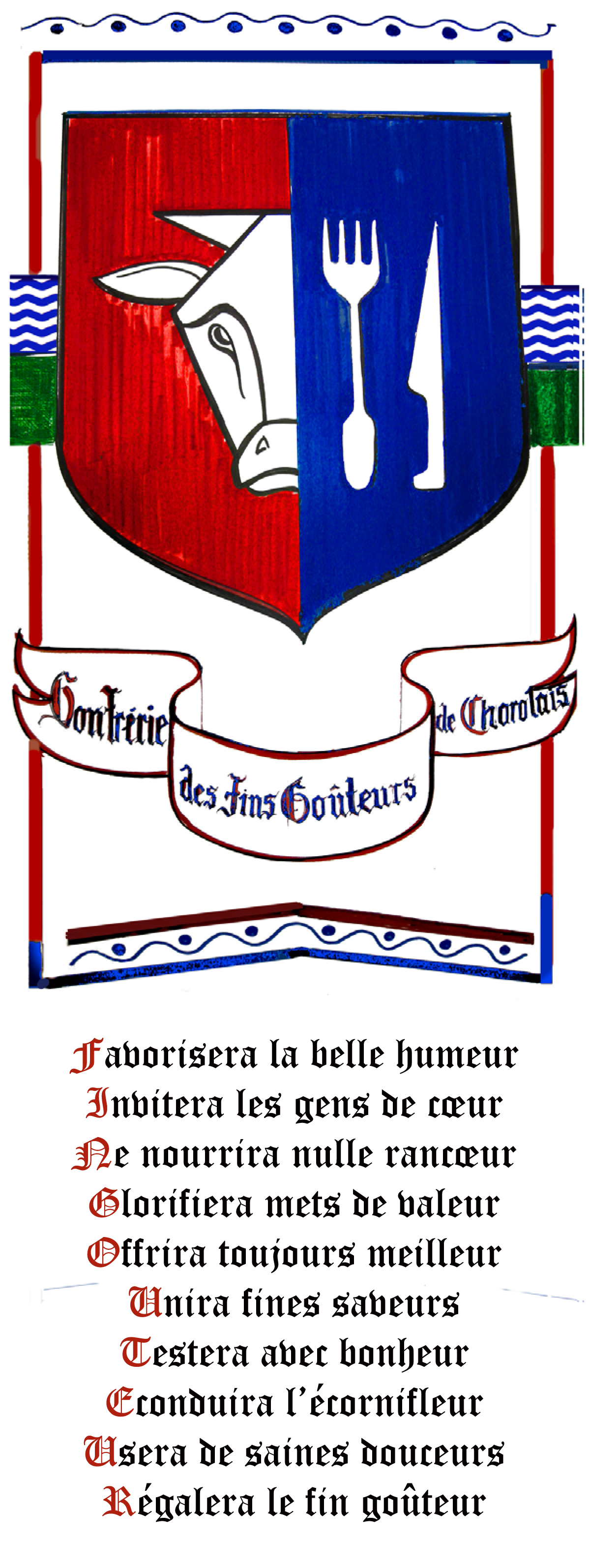 Kakémono utilisé lors des chapitres de la confrérie